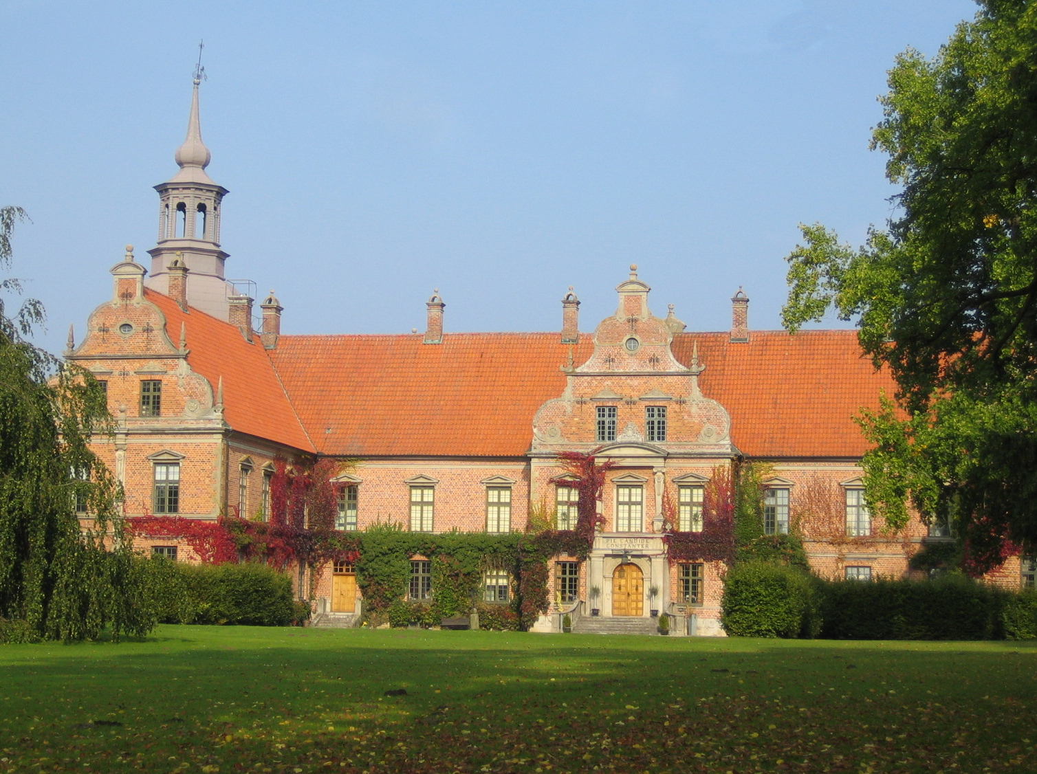 Karsholms slott. Bilden tagen av mig själv 9 oktober 2005.